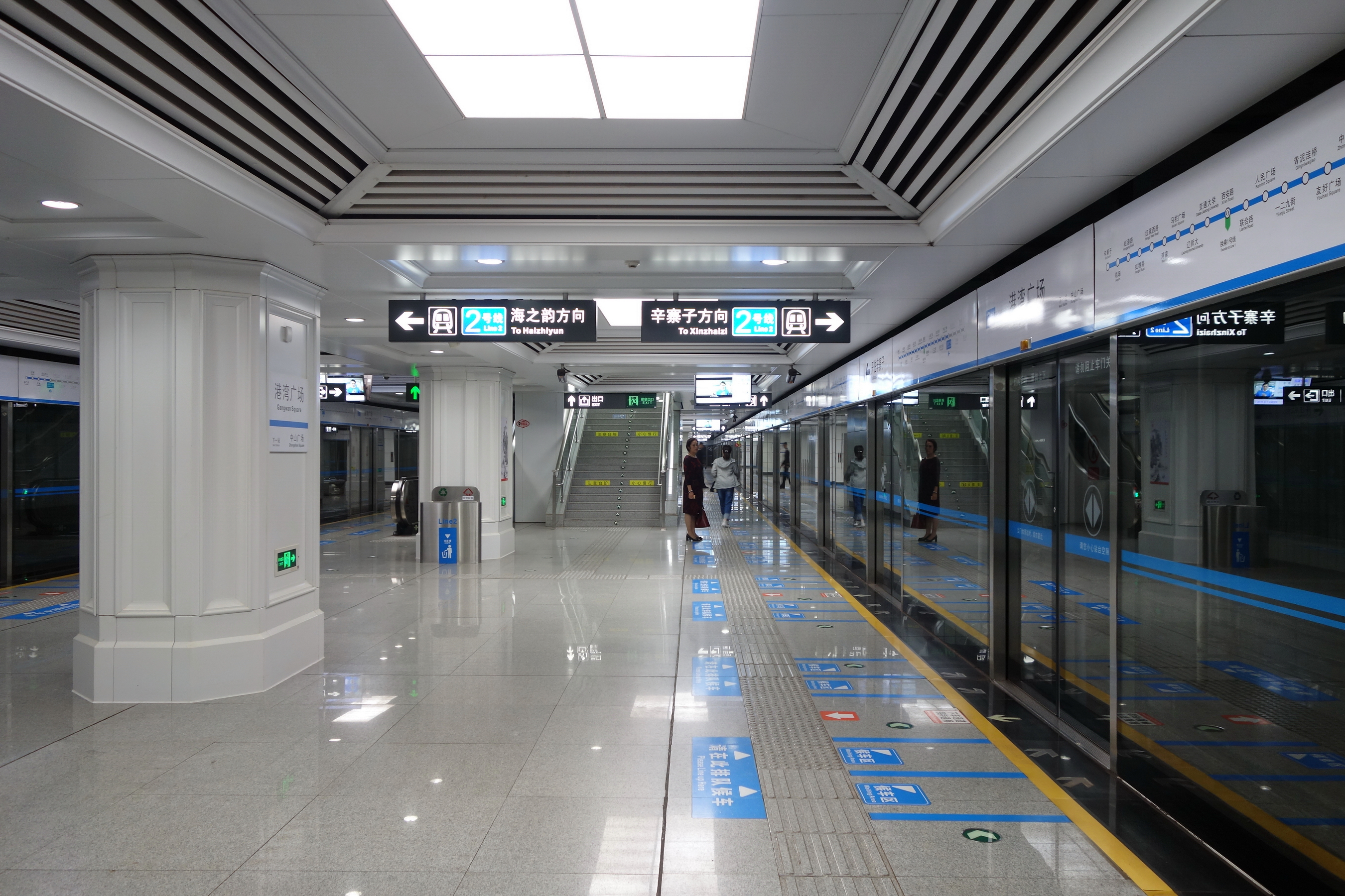 大连地铁2号线港湾广场站